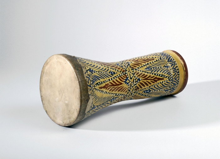 Het vel van deze bekertrom is op het tromlichaam van aardewerk gelijmd. Het tromlichaam is beschilderd met geometrische motieven. De onderkant van het tromlichaam is open. Dit instrument wordt in heel Marokko in de volksmuziek gebruikt.